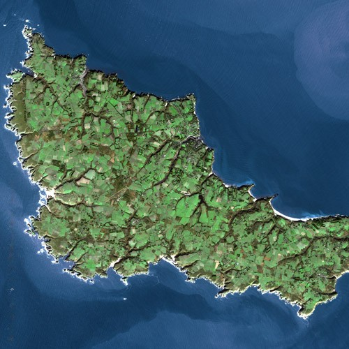 Belle Ile by SPOT Satellite